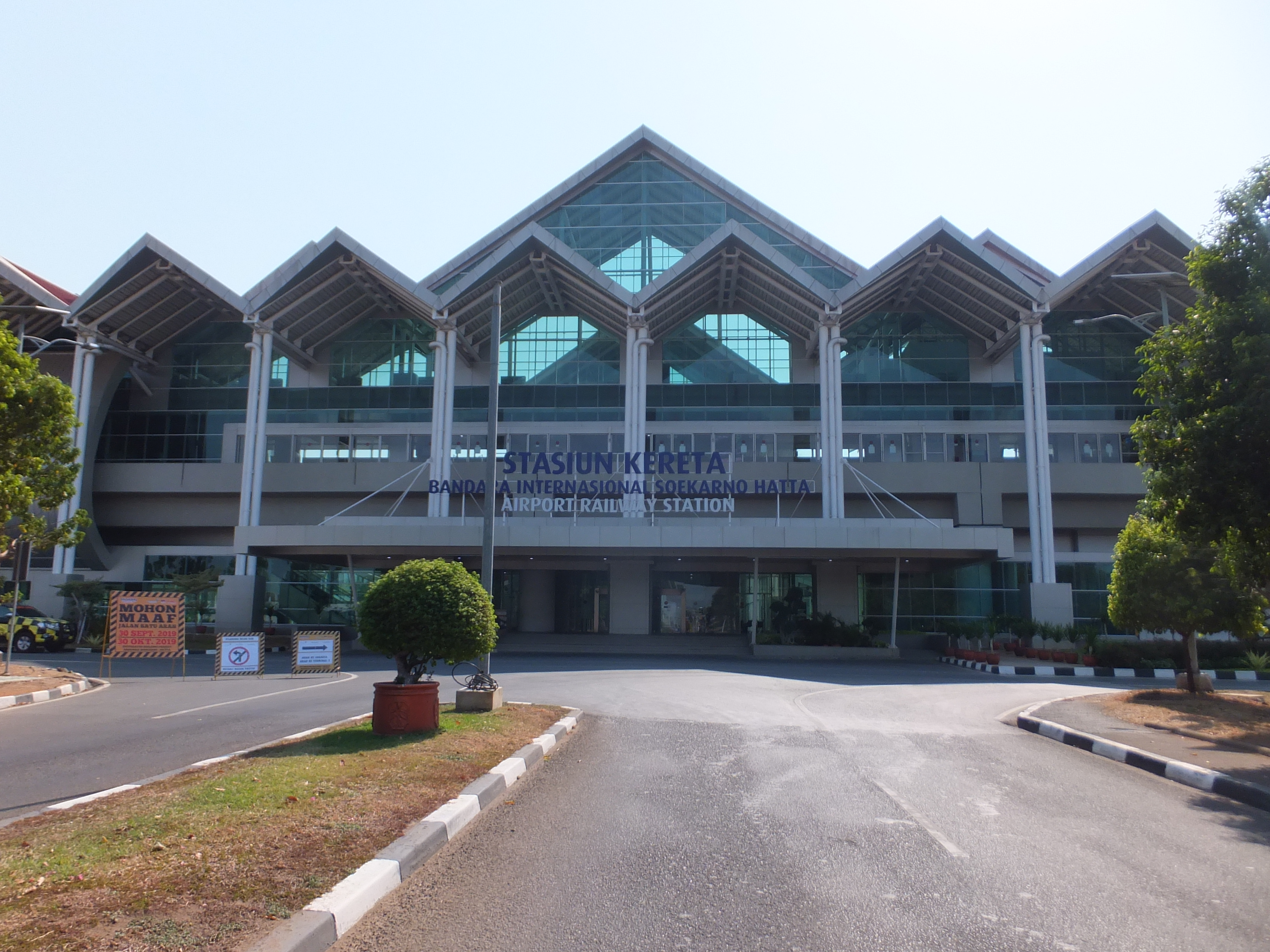 スカルノ・ハッタ国際空港駅 外観